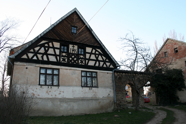 Dobrá Voda (Dobrawod) u Toužimi v České republice